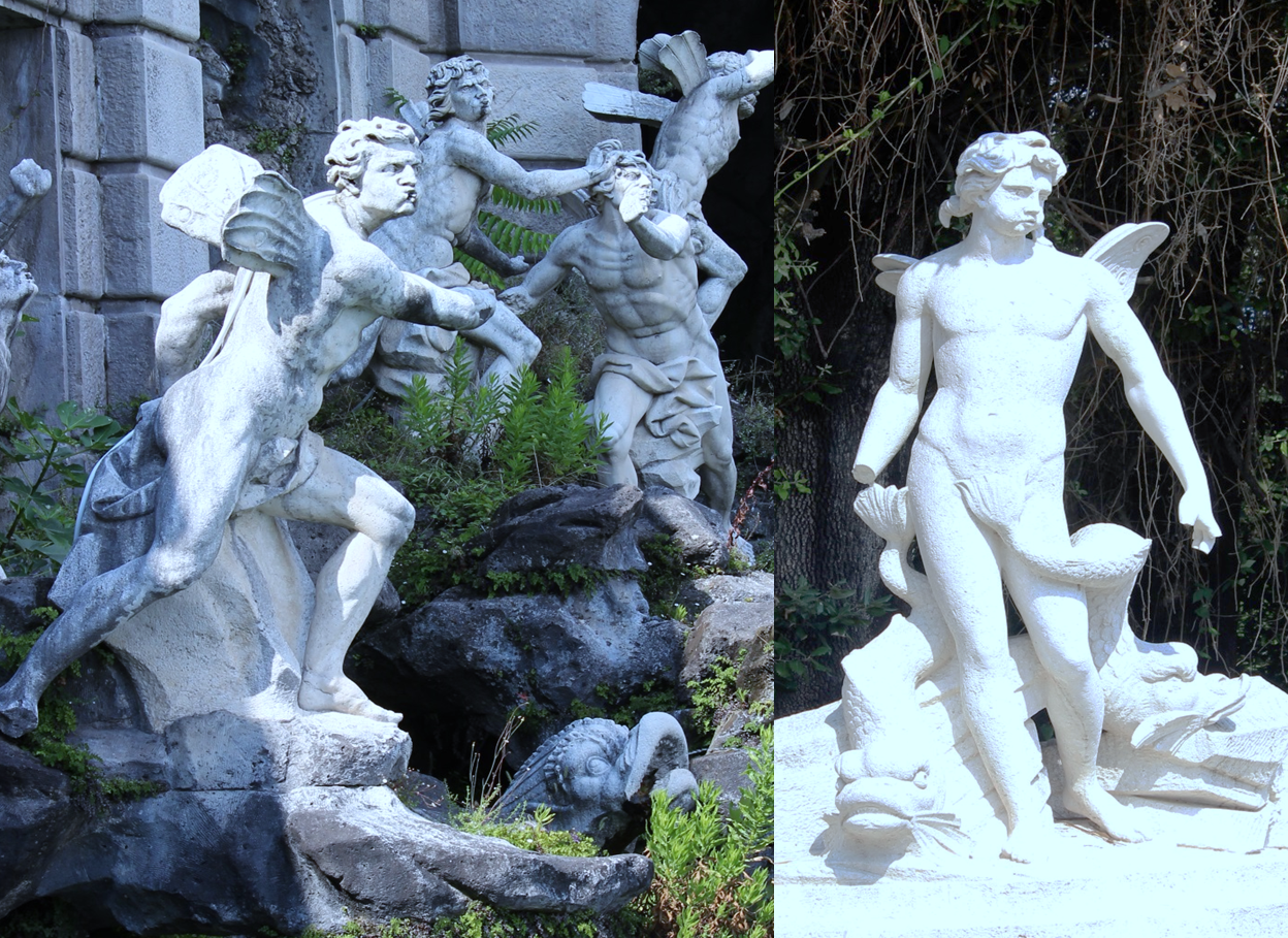 Il dio dei venti, Eolo. Immagine formata da: 1 e 2